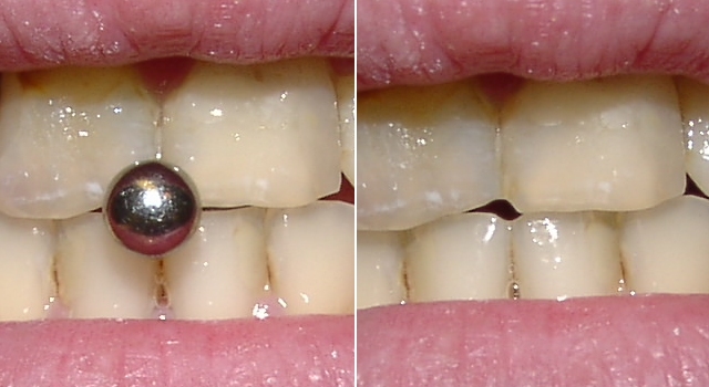 Zahnschaden durch Zungenpiercing. Links wurde das Piercing oft zwischen den vorderen Zähnen gehalten, rechts ohne das Piercing. Man erkennt ein passendes Loch für die Piercingstange.